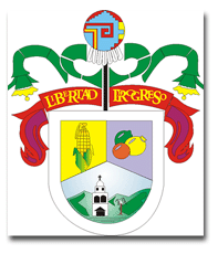 escudo de jocotepec